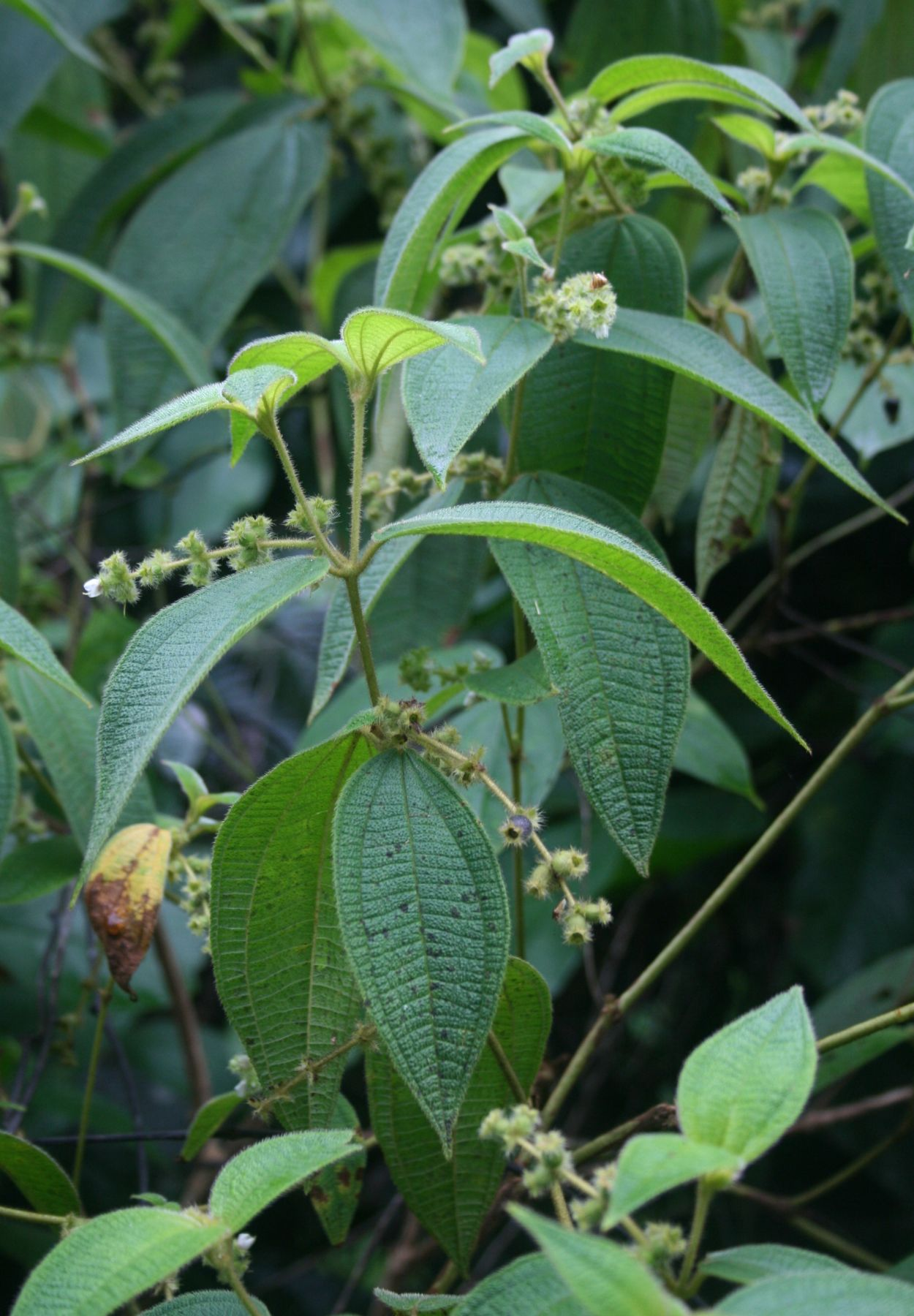 Clidemia capitellata, Schwarzmundgewächse (Melastomataceae) - Costa Rica: Prov. Puntarenas, La Gamba NW Golfito, nahe der "Esquinas Rainforest Lodge"